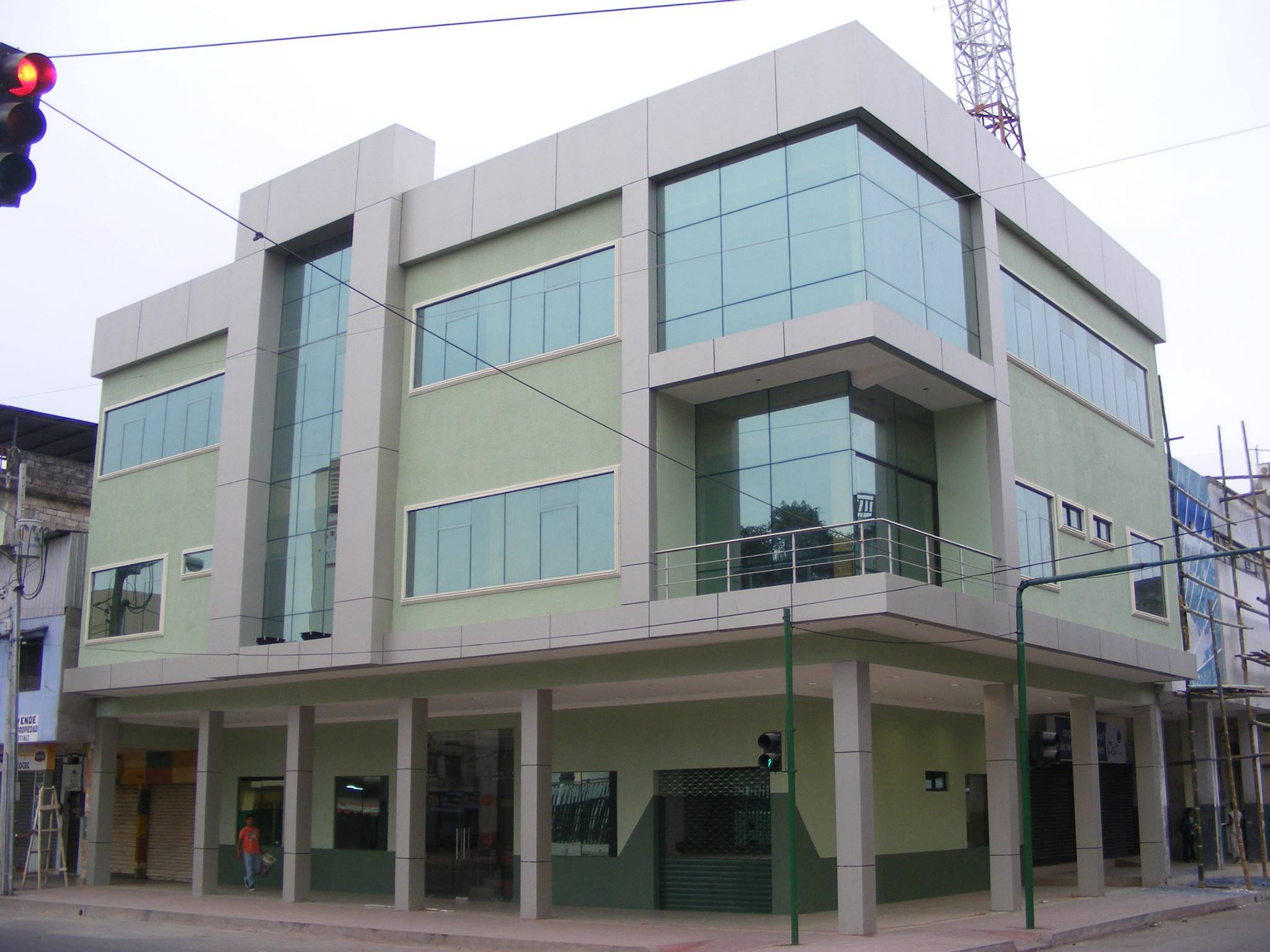 Acaldia de Ventanas